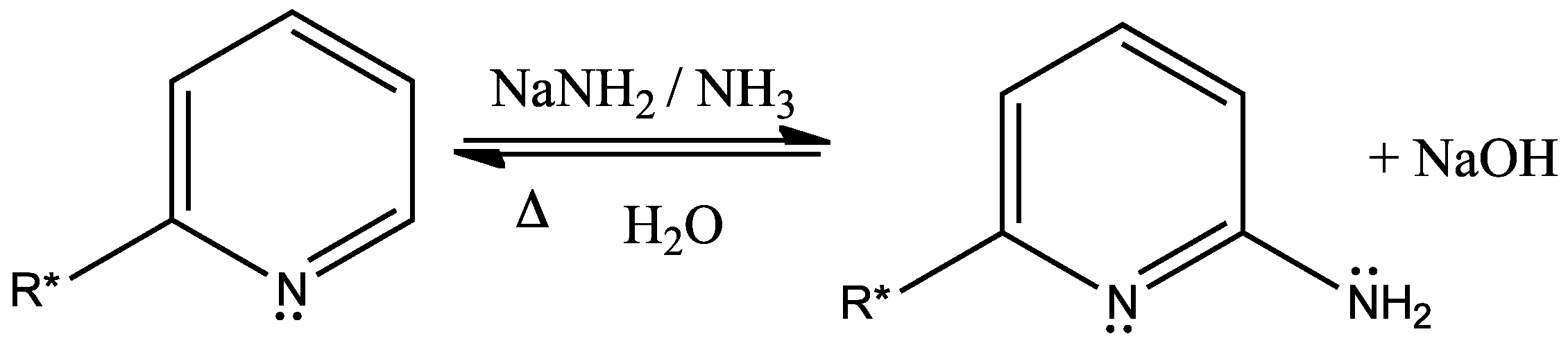 Реакция на Чичибабин.